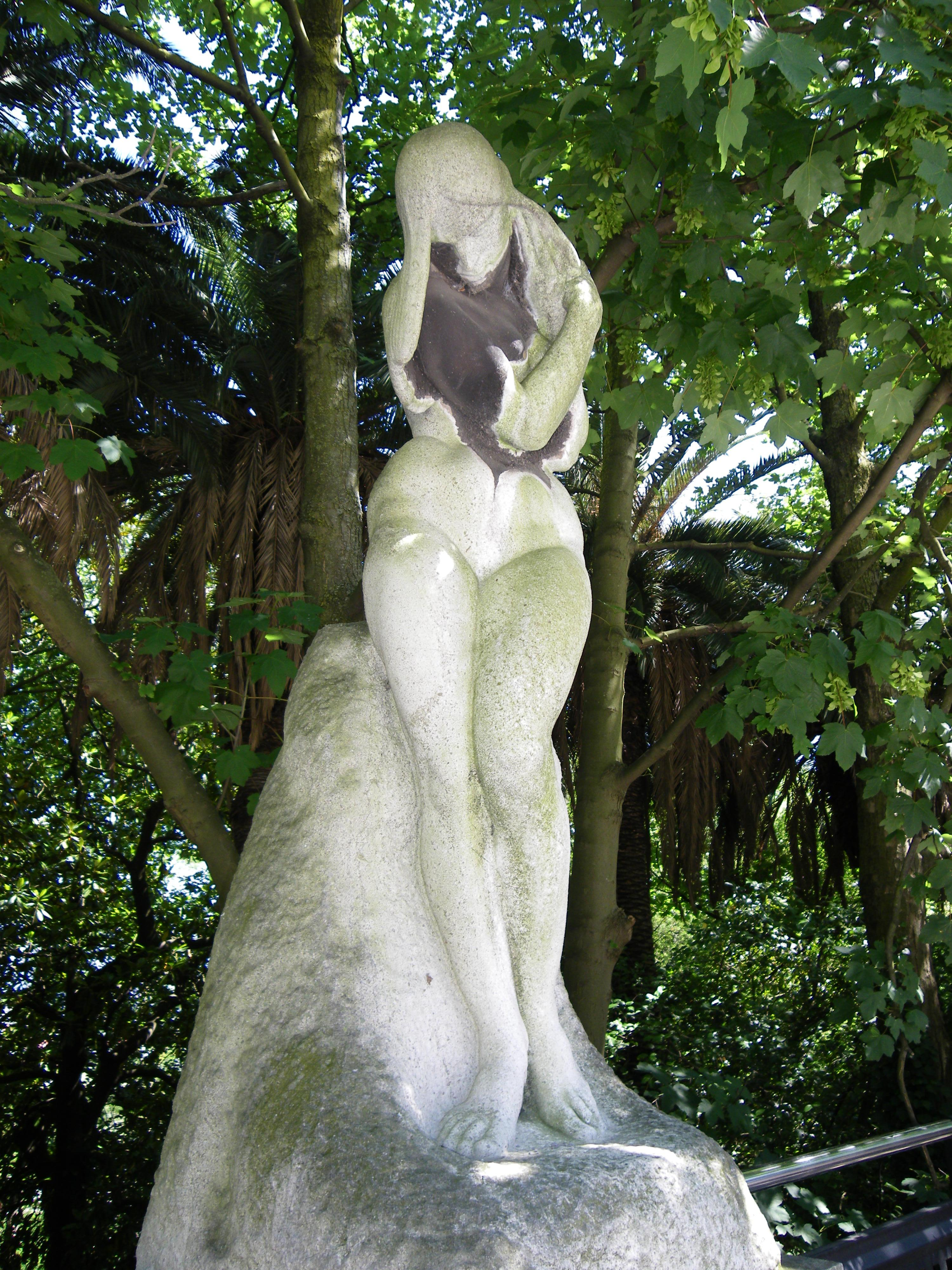 Munoa jauregia inguratzen duen eragin ingeleseko lorategian kokatuta dagoen eskultura bat. Barakaldo, Bizkaia, Euskal Herria.